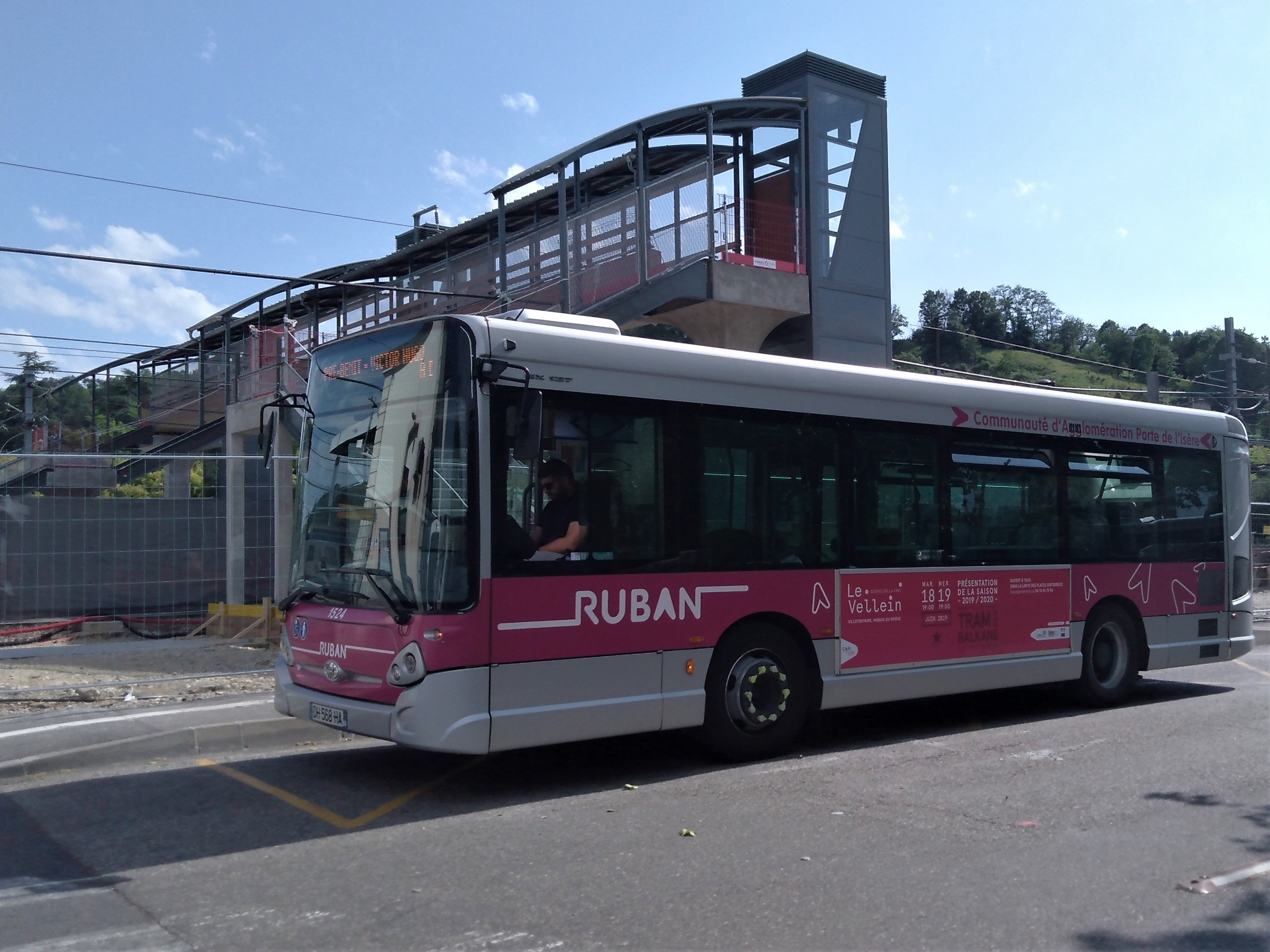 Bus Ruban devant la gare de Bourgoin-Jallieu